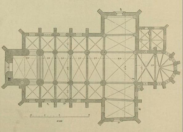 Evangelische Pauluskirche (Hamm)